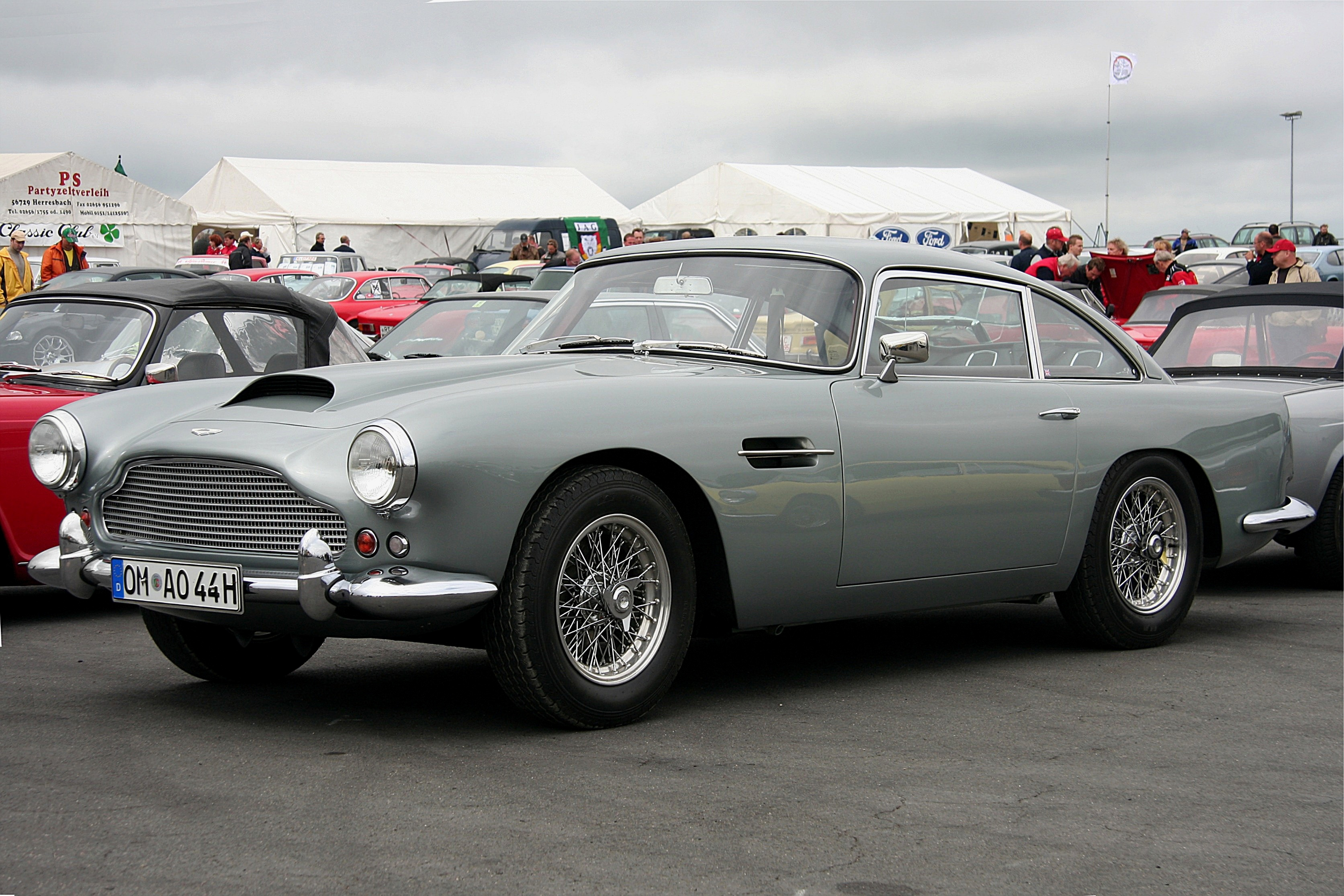 Aston Martin DB 4, Baujahr 1960 at Oldtimer Festival Nürburgring 2008